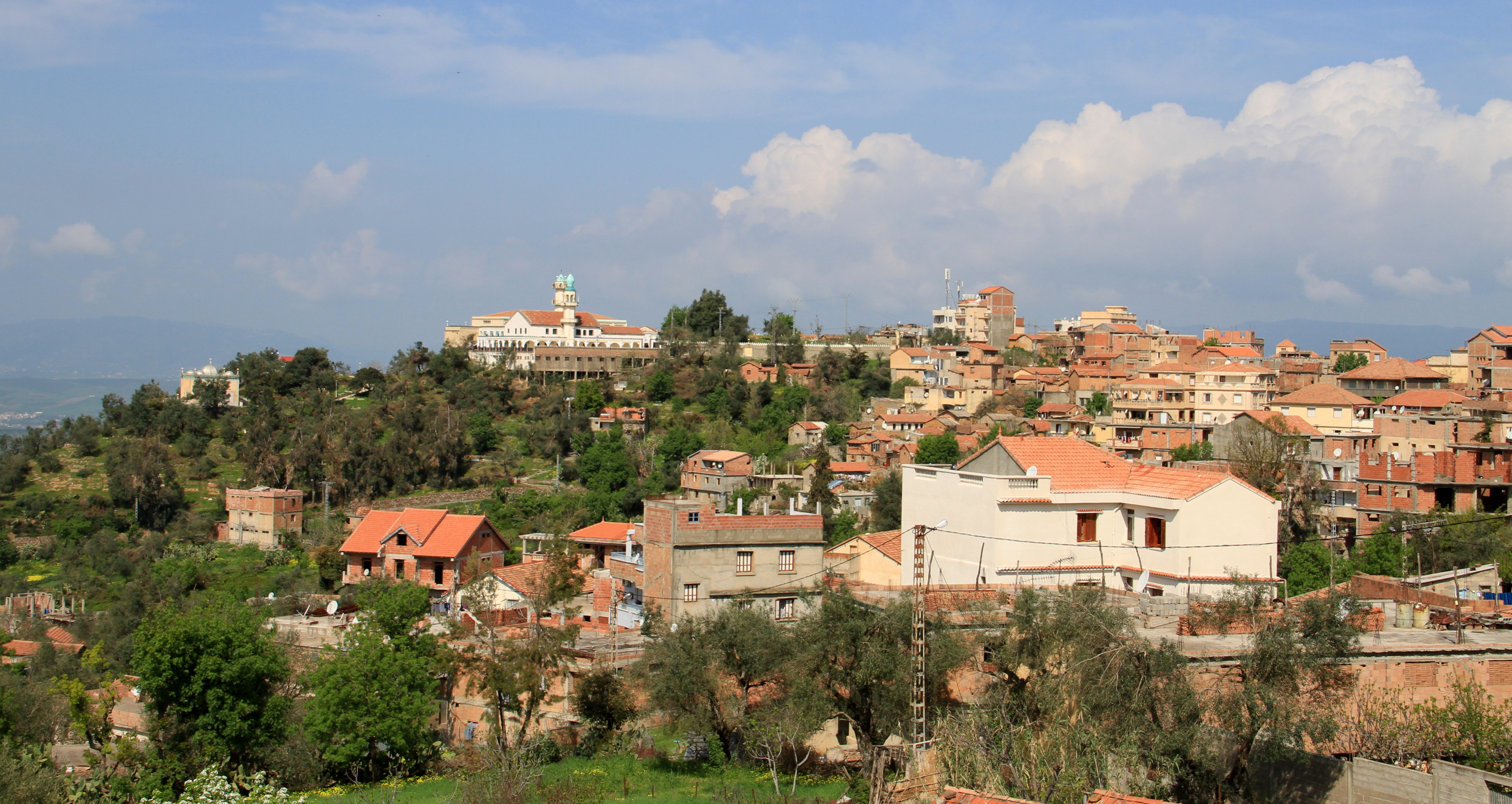 unique-phare-stratégique